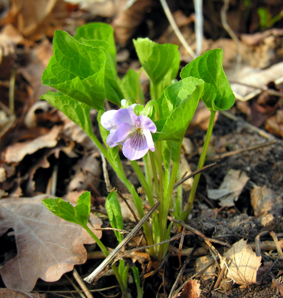 Šlaitinė našlaitė (Viola collina) Šeima. Našlaitiniai (Violaceae) Fotografavo: Algirdas, 2006 m. balandžio 28 d.